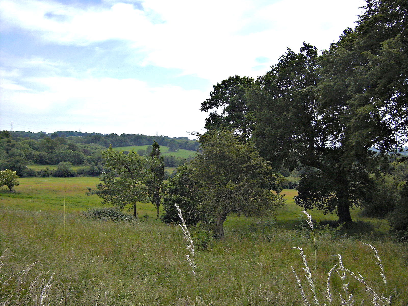 Das Schlachtfeld von Norden aus gesehen. (Battle, TN33 0AD, UK)